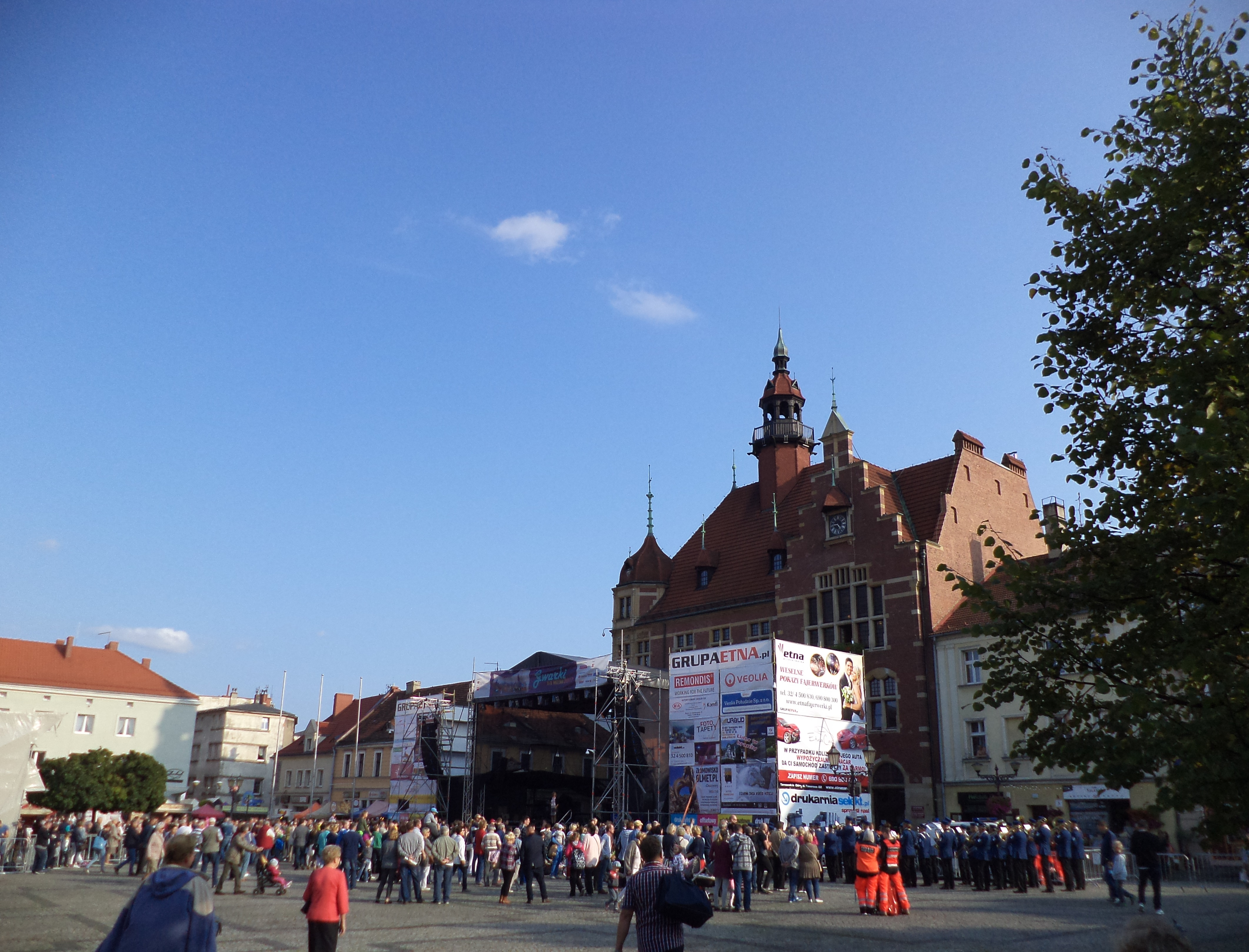 Rynek w Tarnowskich Górach. Gwarki 2017. Widoczny ratusz